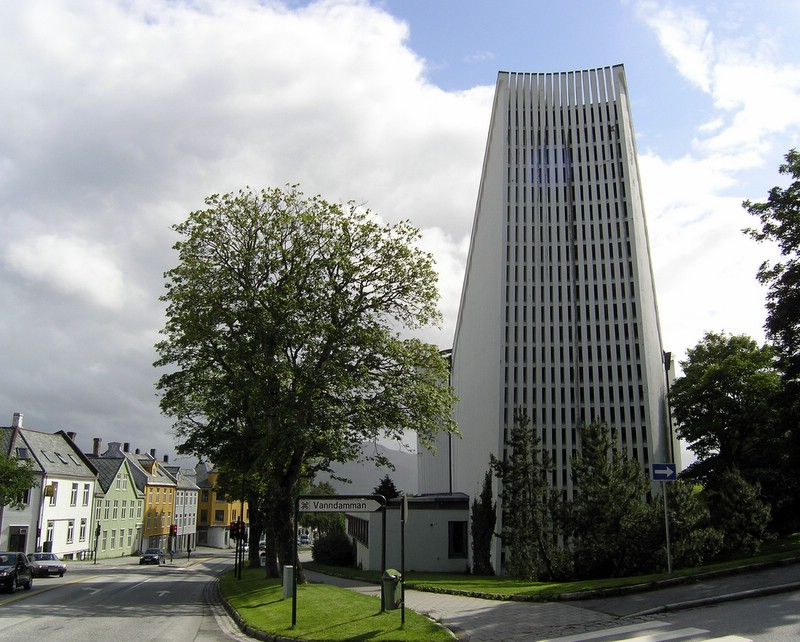 Kirkelandet Kirke, baksiden mot altertavle og glassmaleri. Foto: Jon Rogne 23:11, 13 July 2006 (UTC)